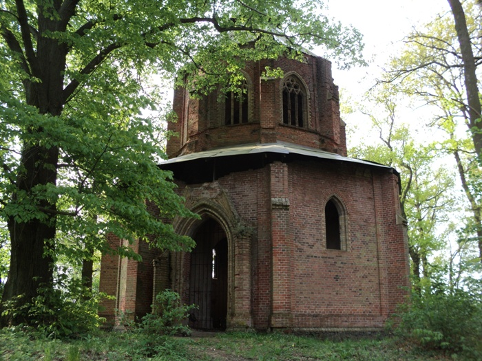 Kapellenruine auf einem Hügel, ca. 400 m südlich vom Ort